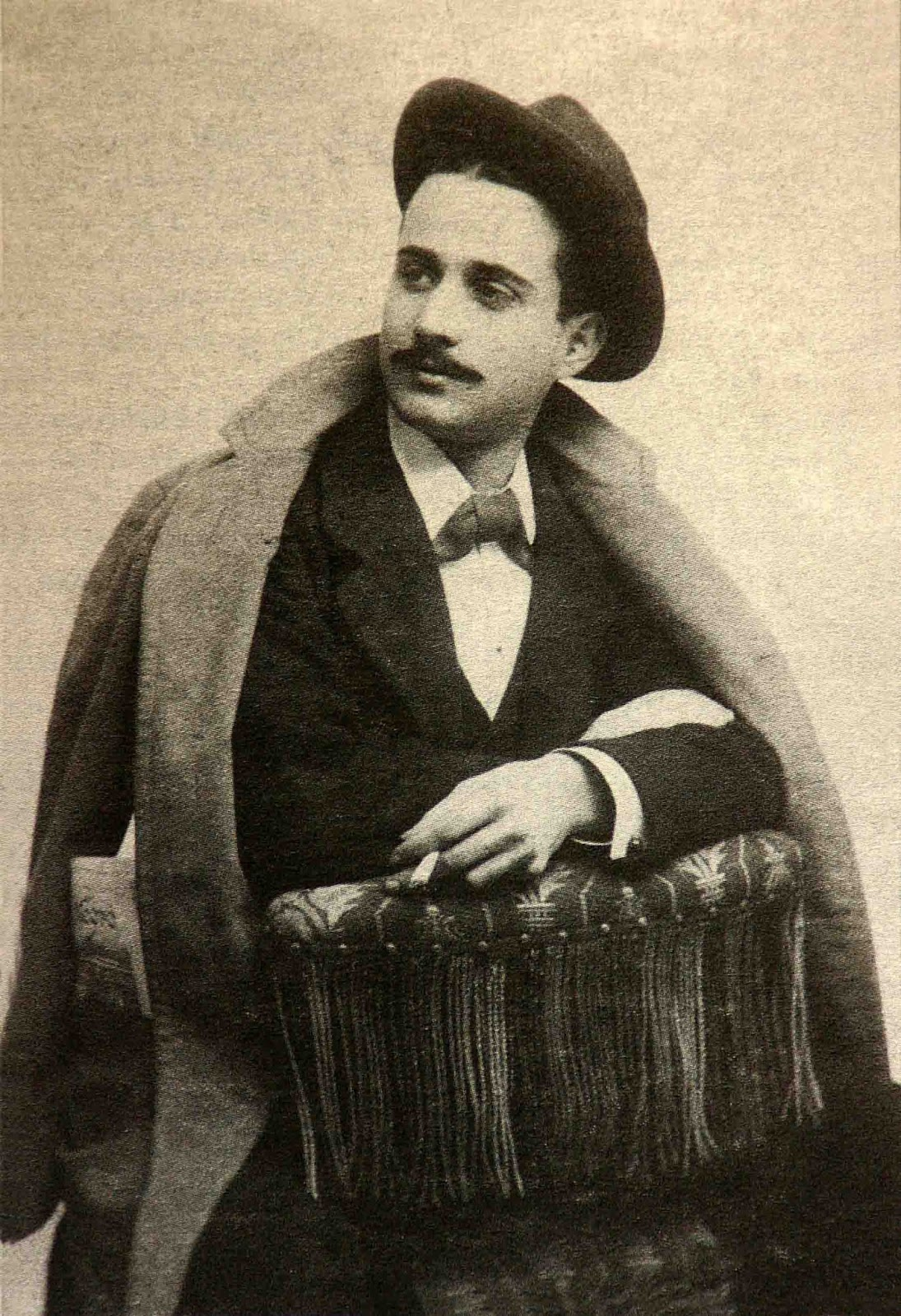 Miguel Mihura